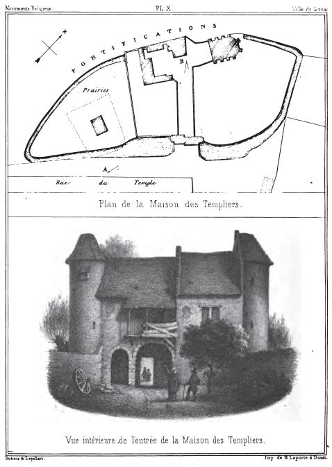 Maison des templiers de Douai - vue intérieure entrée